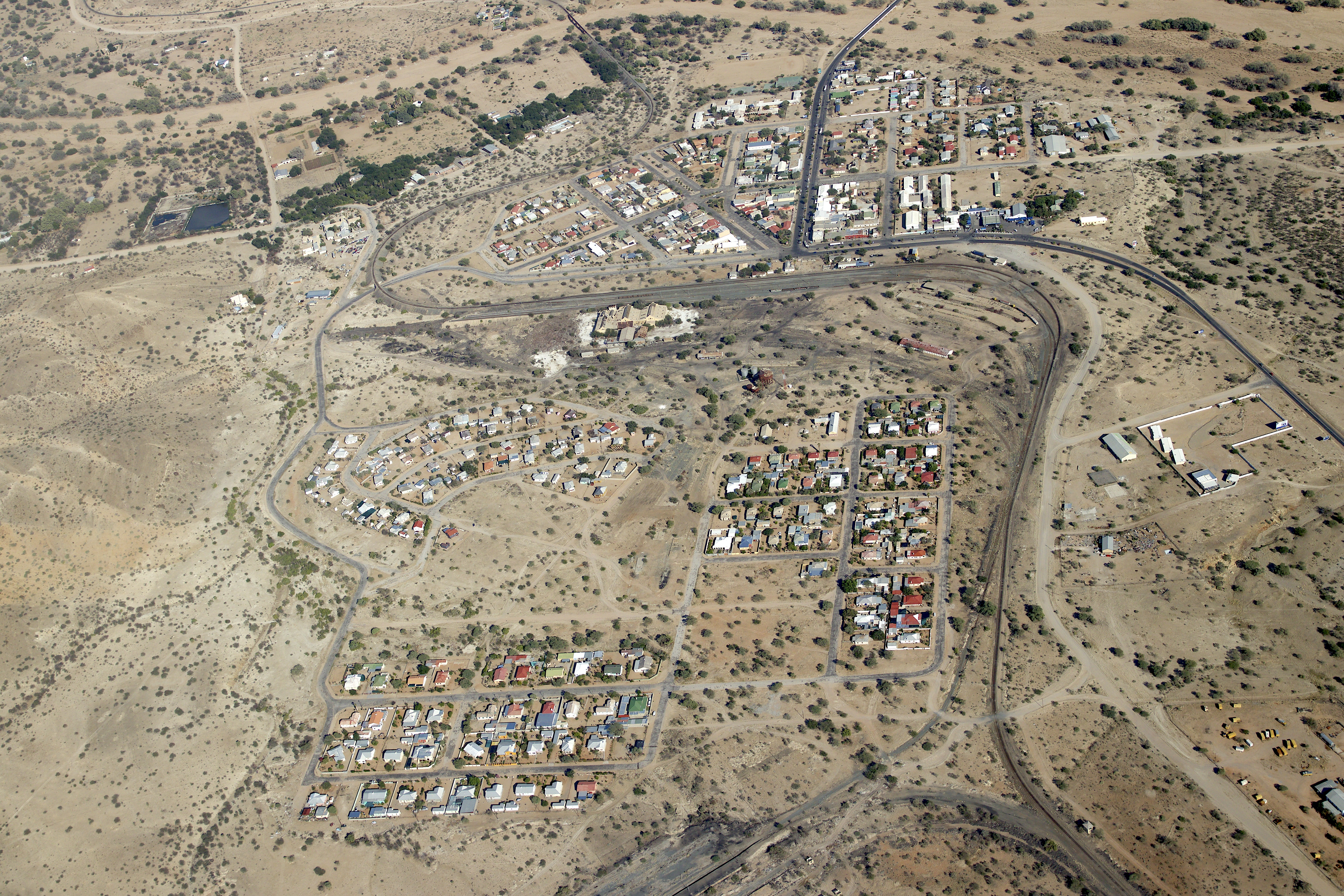 Usakos Luftaufnahme (2018)